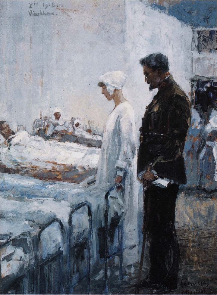 Koningin Elisabeth en dr. Antoine Depage in het militair hospi­taal van Vinkem (Alfred Bastien, 1918)